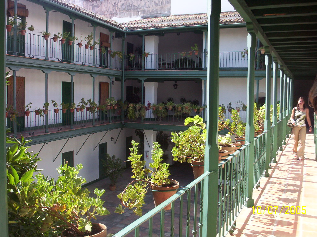 Fotografía del Corral del Coliseo, en Sevilla